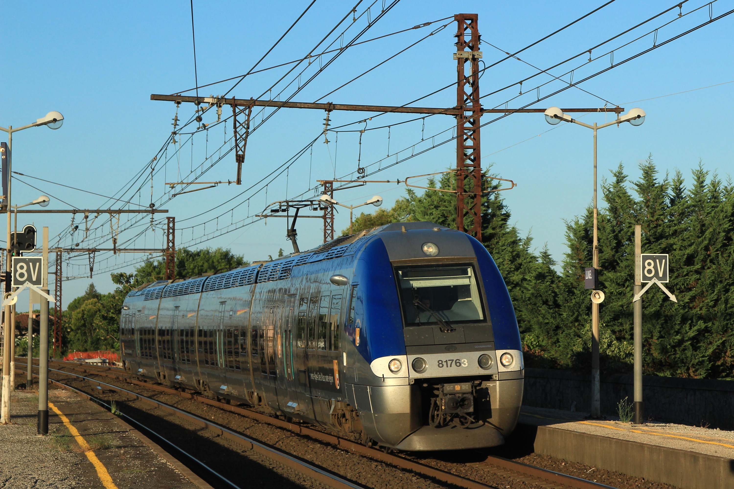 Le B 81763 assurant le TER 876520 (Marseille - Narbonne) arrive en gare de Lunel.